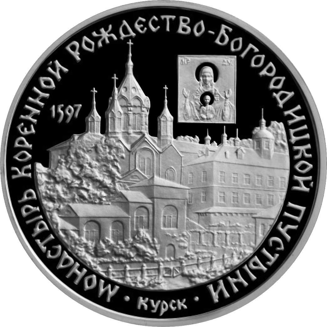 Монета Банка России — Серия: «Памятники архитектуры России», Монастырь Курской Коренной Рождество-Богородицкой пустыни, 3 рубля, реверс.